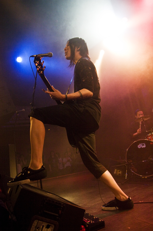 Foto: Rosario López